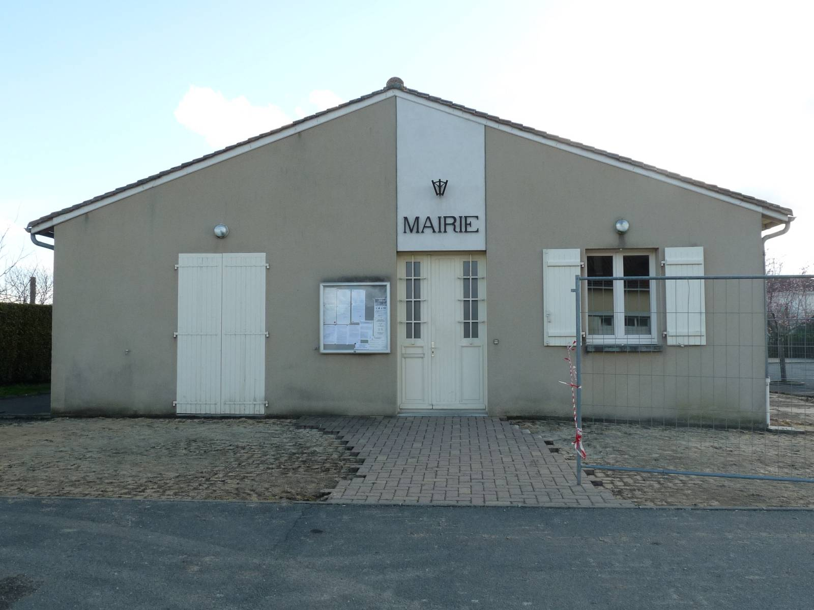 mairie de Chassenon, Charente, France